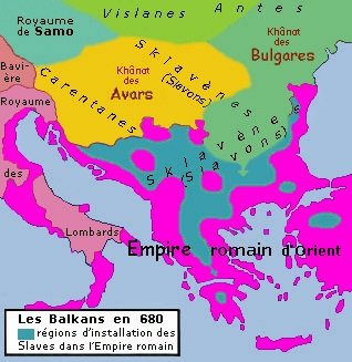 Régions d'installation des Slaves dans l'Empire romain en 680.